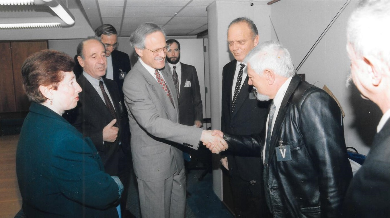 שגריר ארה"ב מרטין אינדיק מוסר פרס הבטיחות הגבוהה ביותר ממשמר החופים האמריקאי לאחר שאניות צים עברו בהצטיינות את מבדקי הבטיחות 1996 .